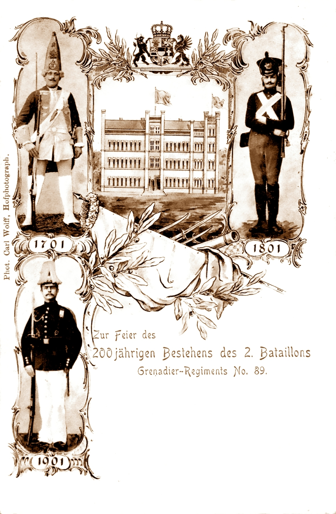 200. Jubiläum der Errichtung des Strelitzer Bataillons, II. Bataillon im Großherzoglich Mecklenburgischen Grenadier-Regiment Nr. 89.